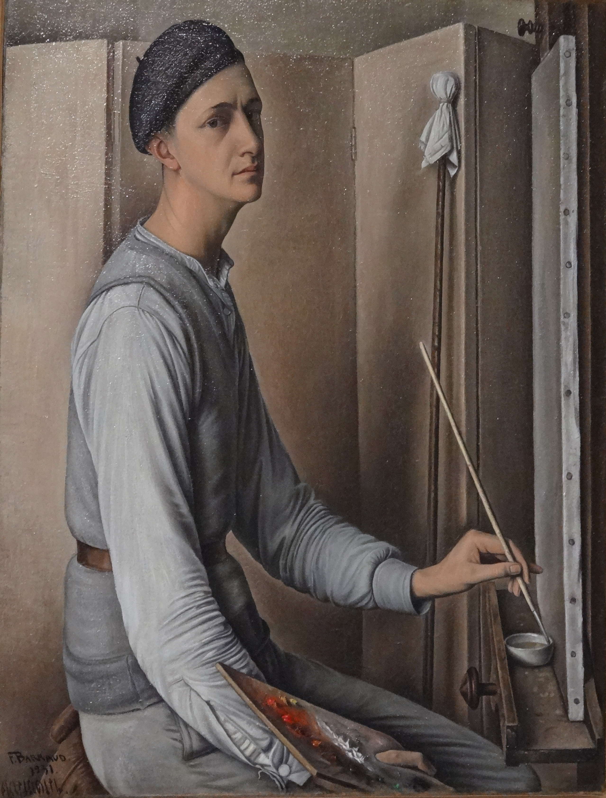 Автопортрет художника за 3 года до смерти